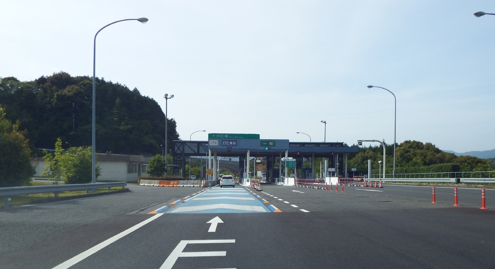 大洲松尾ＴＢ